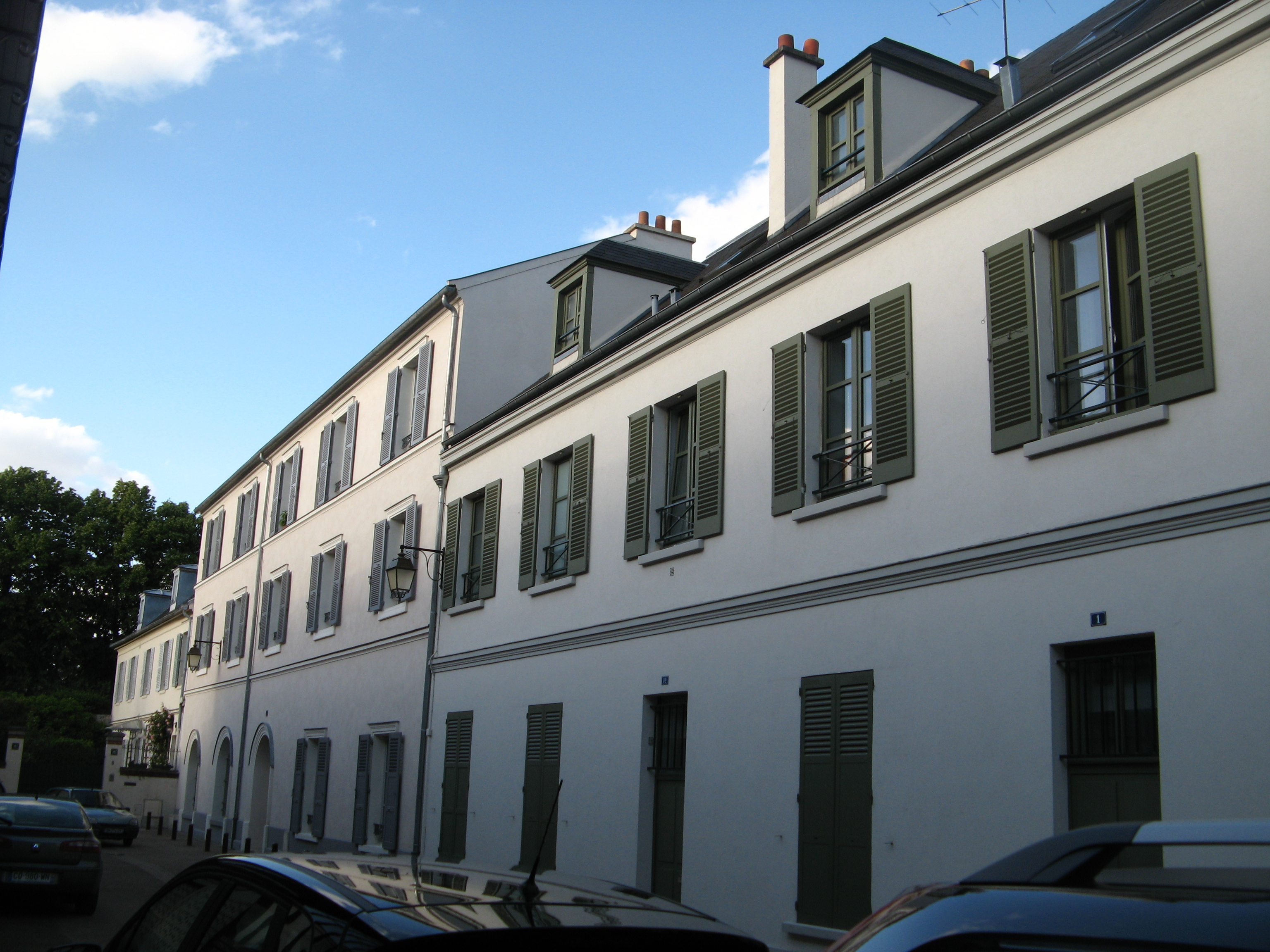 Vue de de l'ancienne gare de Sceaux reconvertie en habitation depuis l'impasse du Marché.